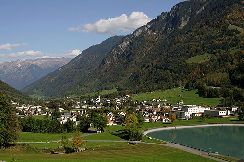 Linthal mit Staubecken des EW